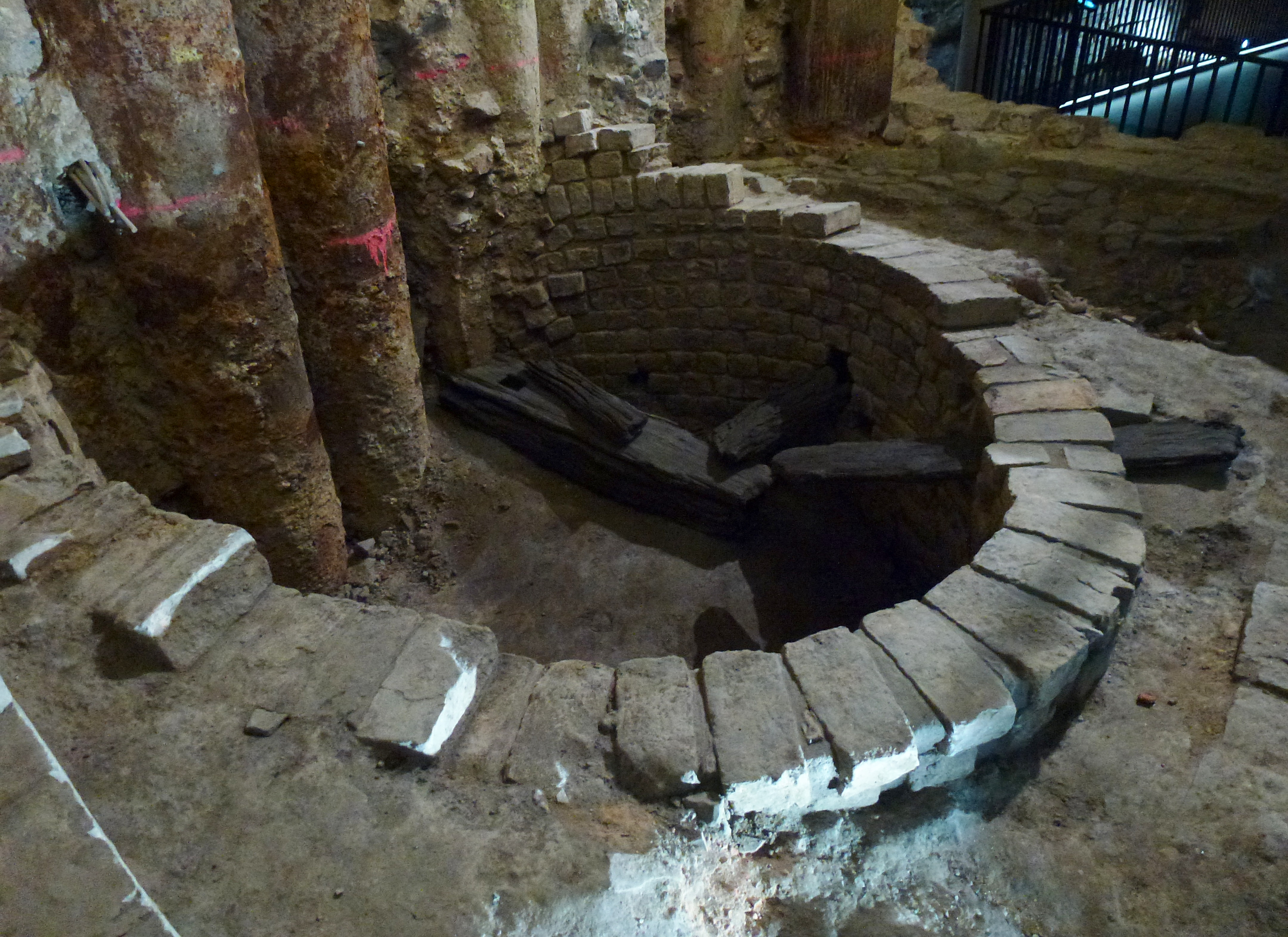 Europäisches Hansemuseum, aktuelle Grabungsstätte